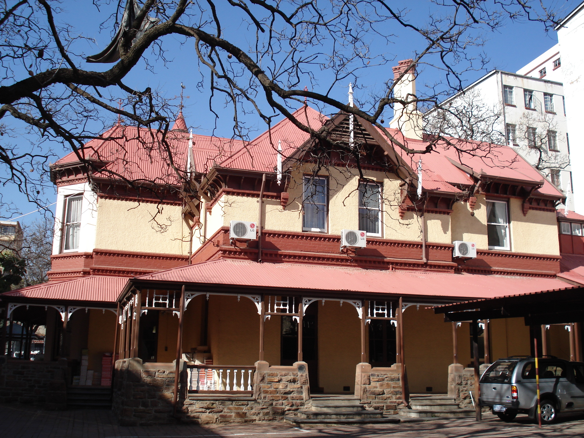 Barton Keep in Jacob Maré-straat, Pretoria This media shows a South African Protected Site with SAHRA file reference 9/2/258/0033.